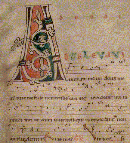 Graduel "Ad te levavi" du premier dimanche de l'Avent.